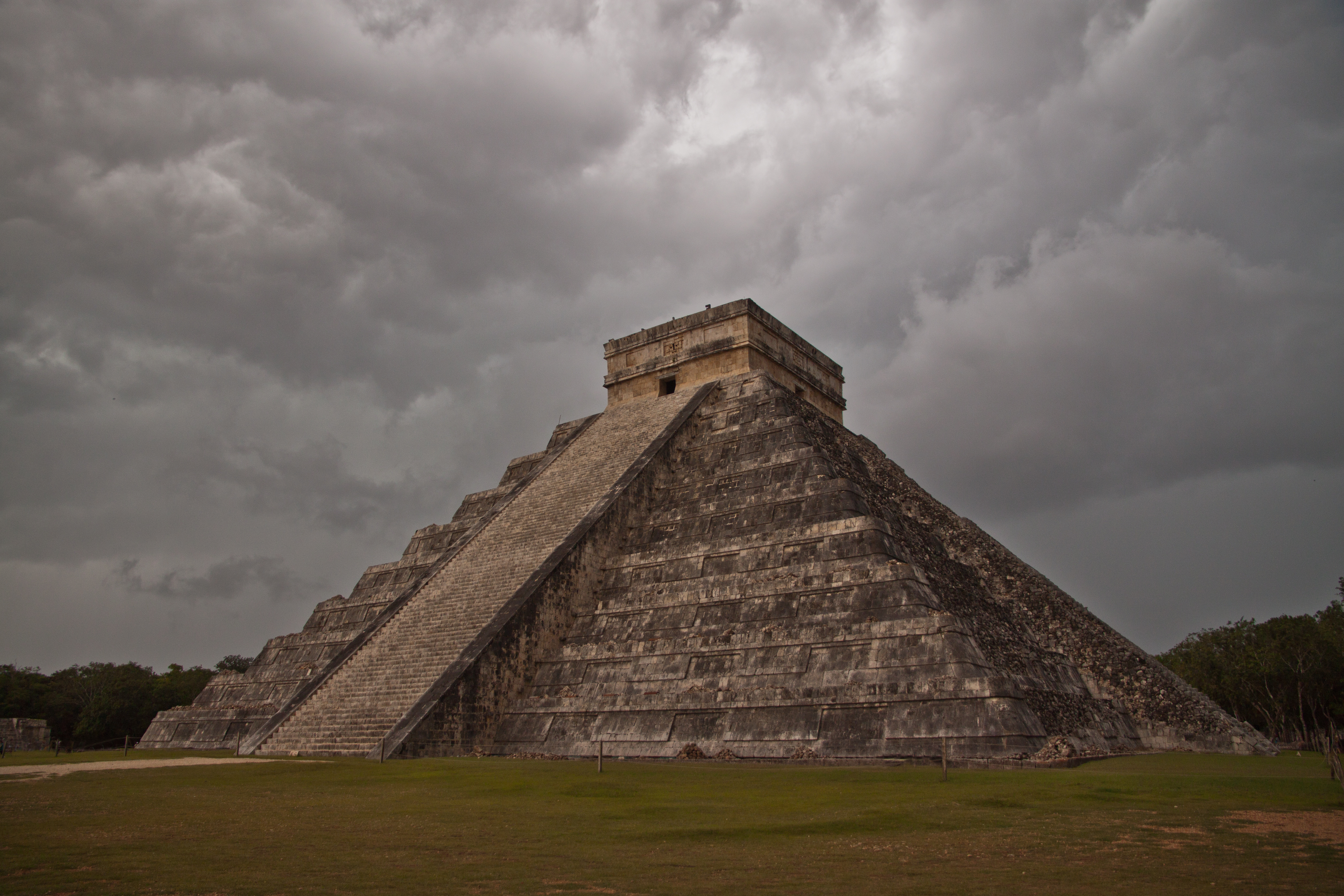 Der Haupttempel von Chichen Itza kurz vor einem Geweitter